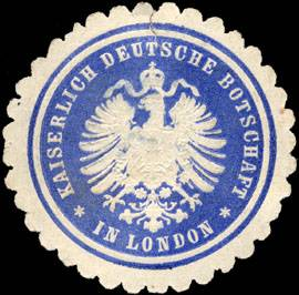 Sealing stamp Title: Kaiserlich Deutsche Botschaft in London Description: blau, weiß, geprägt Place: London size: 4 cm